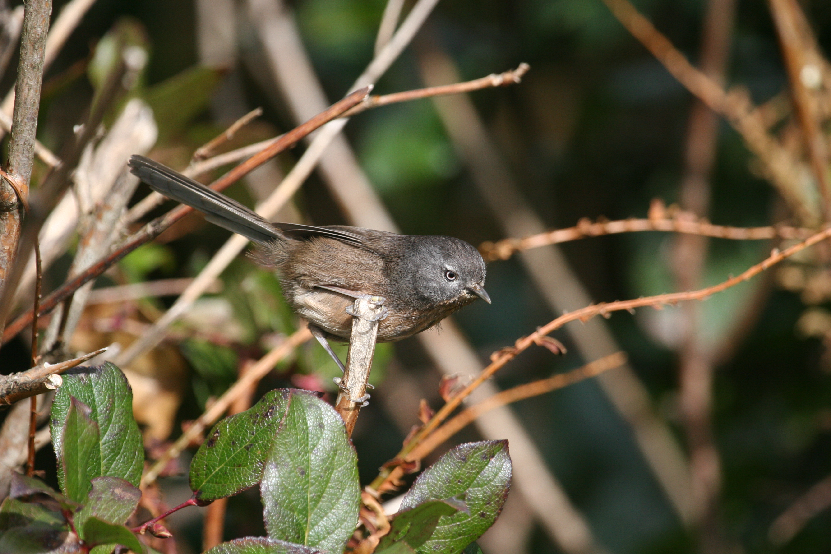 A Wrentit (Chamaea fasciata)